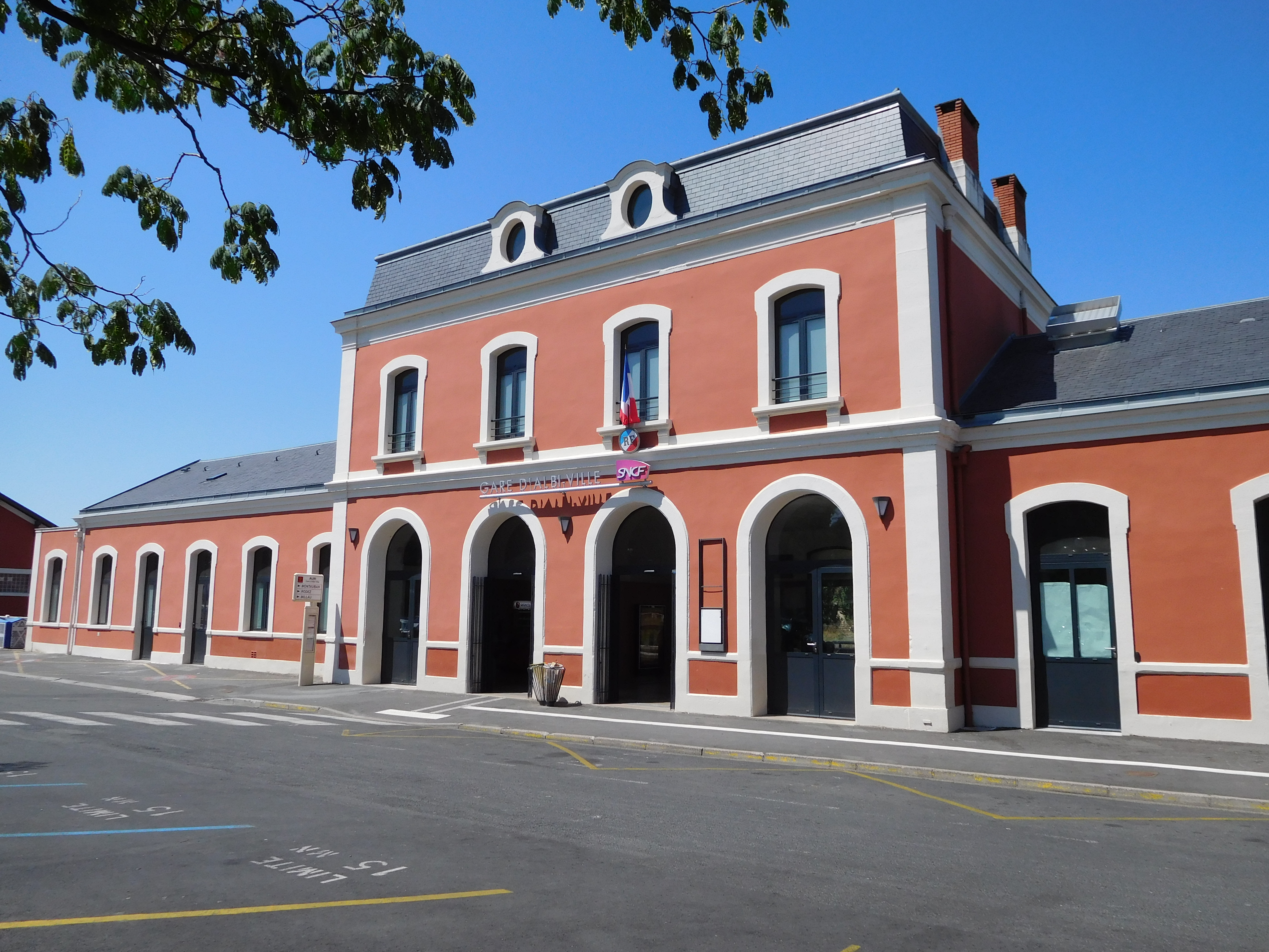 Façade de la gare d'Albi-Ville (département du Tarn, France) en 2018.